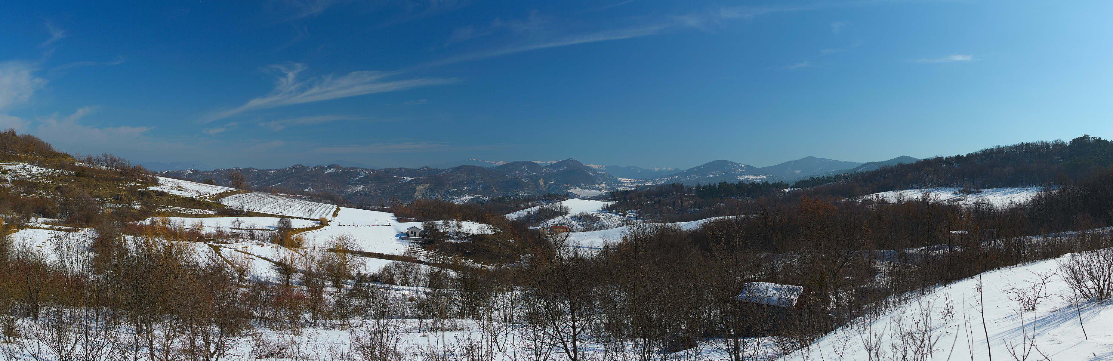 Panorama